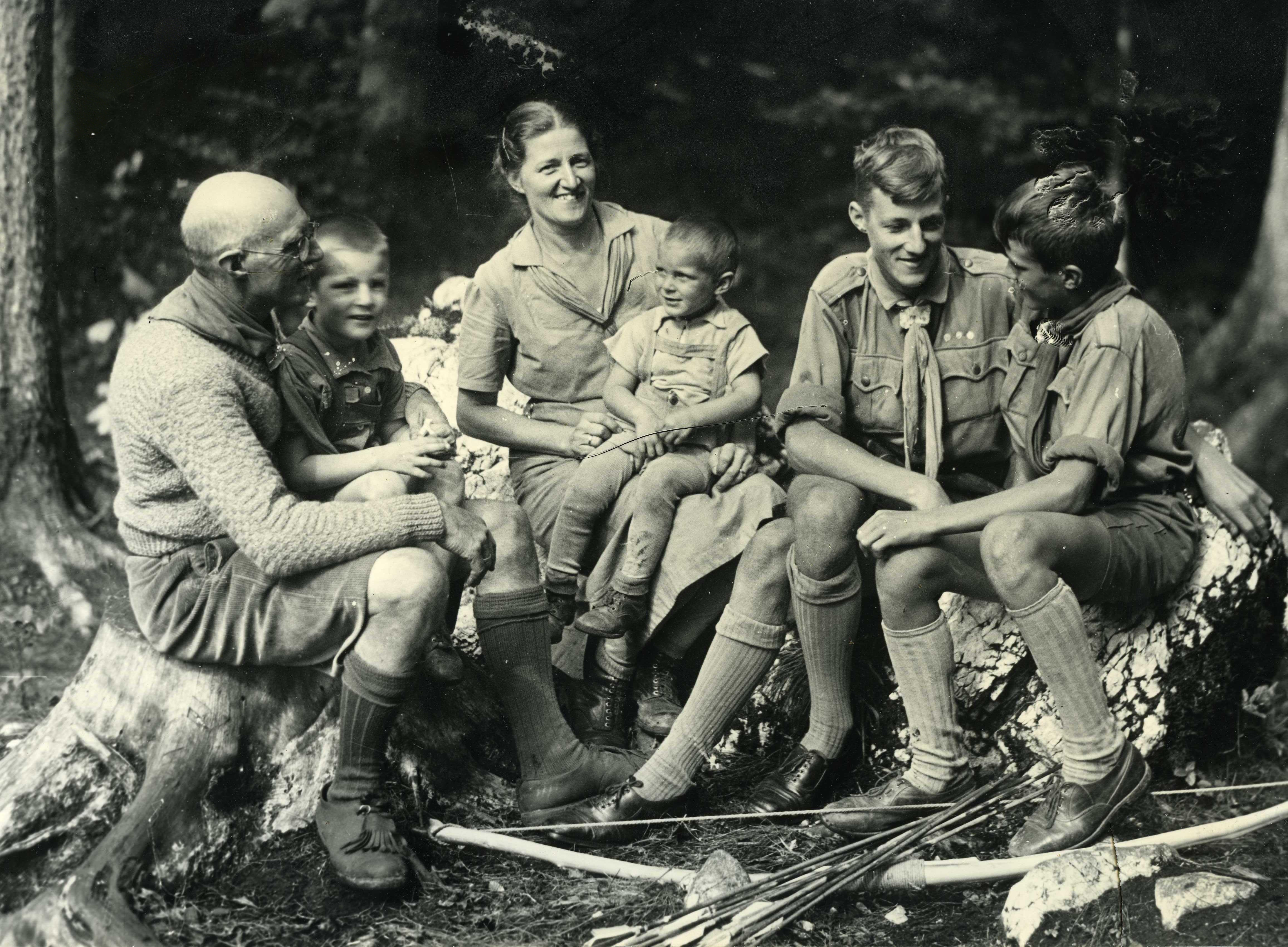 Skavtska družina Kunaver.